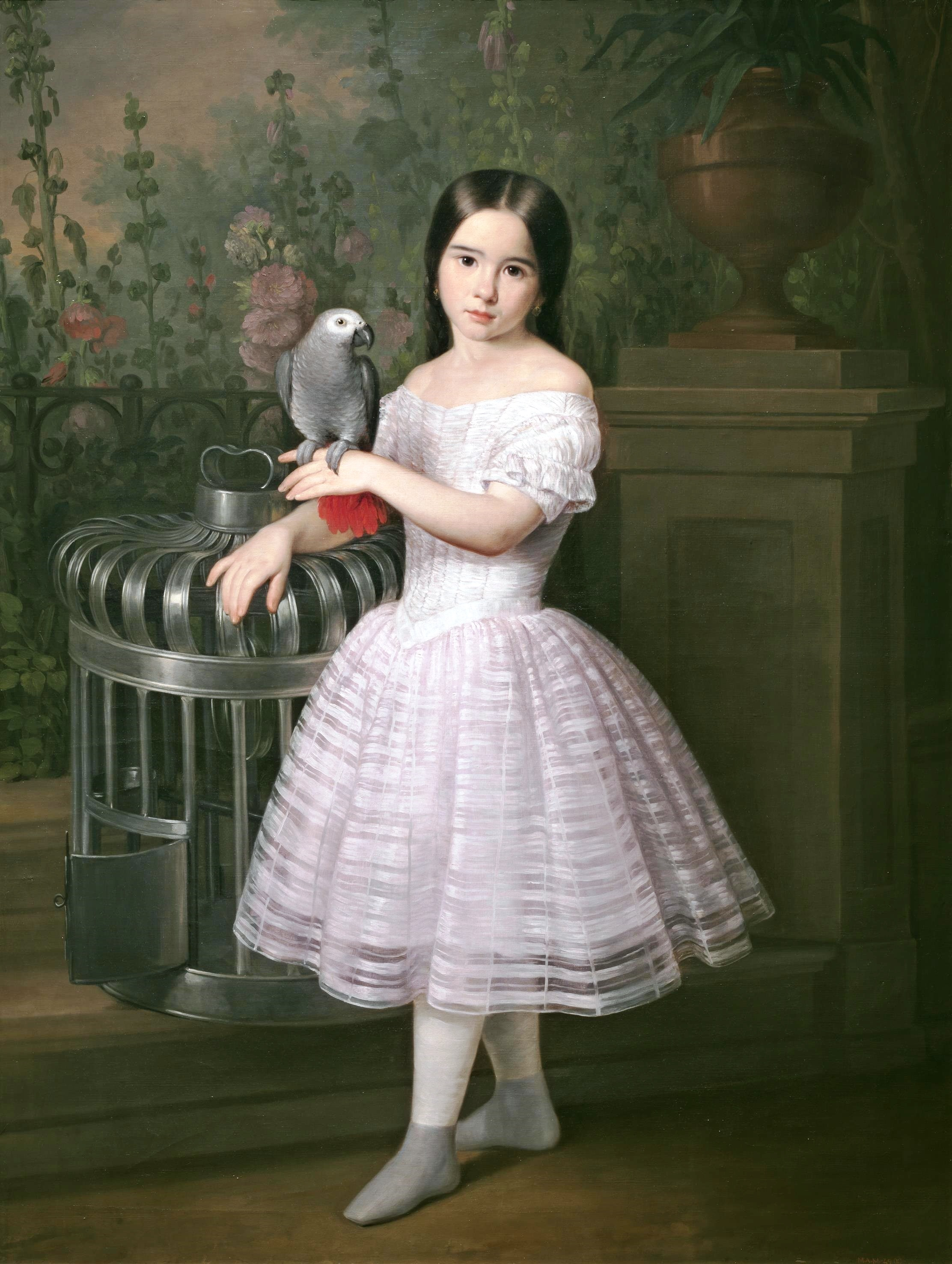 Retrato infantil de Rafaela Flores Calderón.